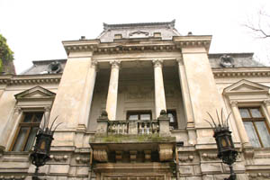 Sediul Uniunii Scriitorilor din România.